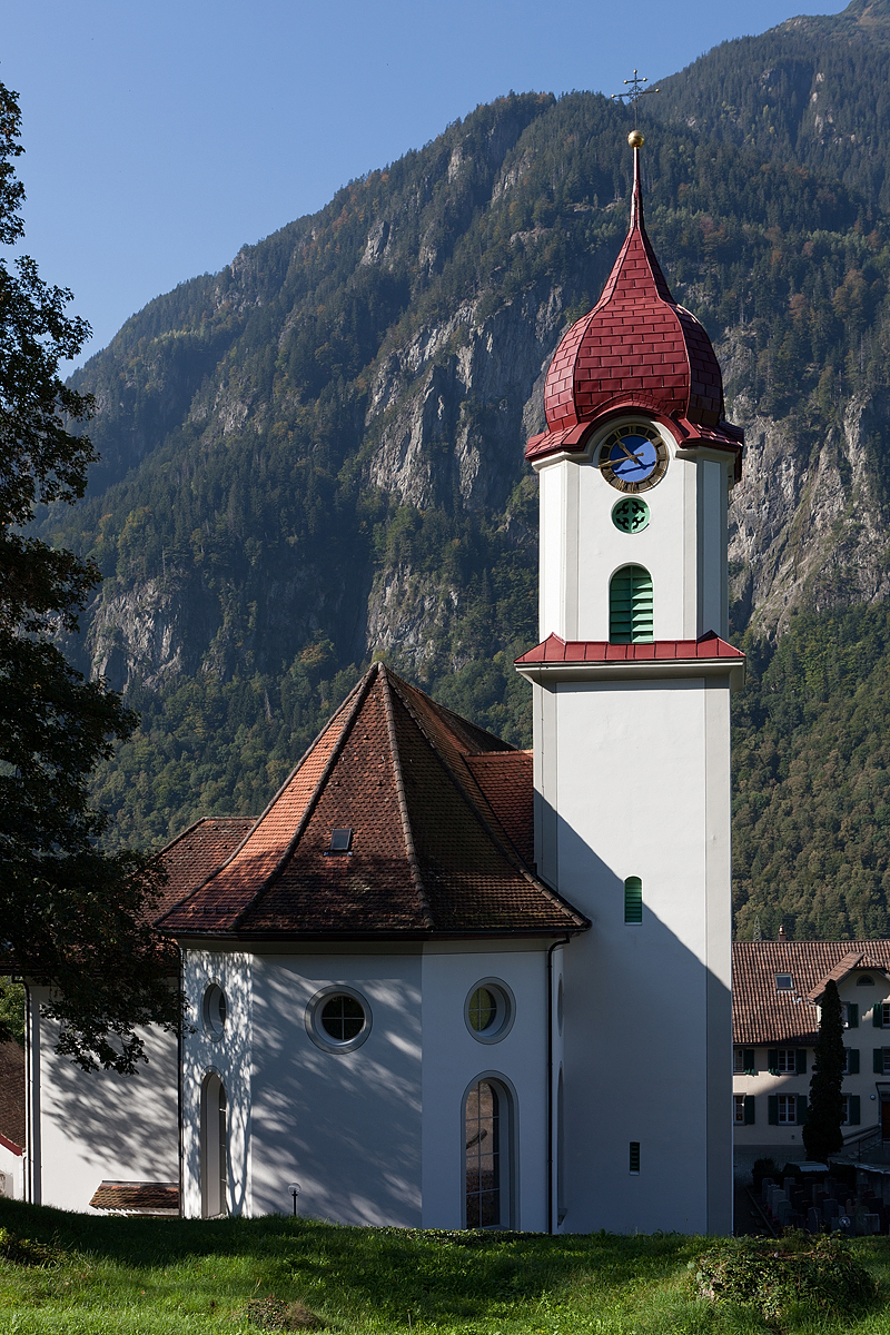 Katholische Kirche St. Albin in Silenen (UR)